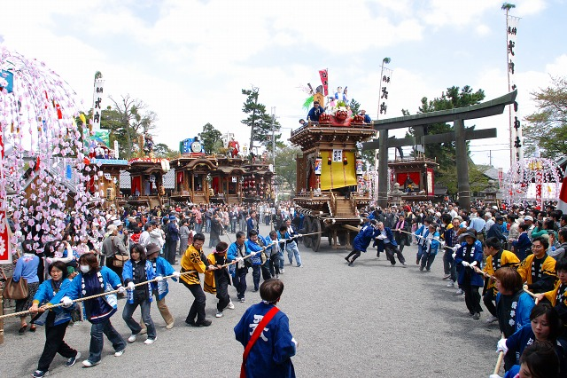 滋賀県甲賀市水口町で毎年４月20日に行われる水口神社の例大祭で、氏子町内（江戸時代の東海道水口宿域）から同社に向けて行われる曳山巡行とそこで奏でられる水口囃子で知られる。滋賀県指定無形民俗文化財